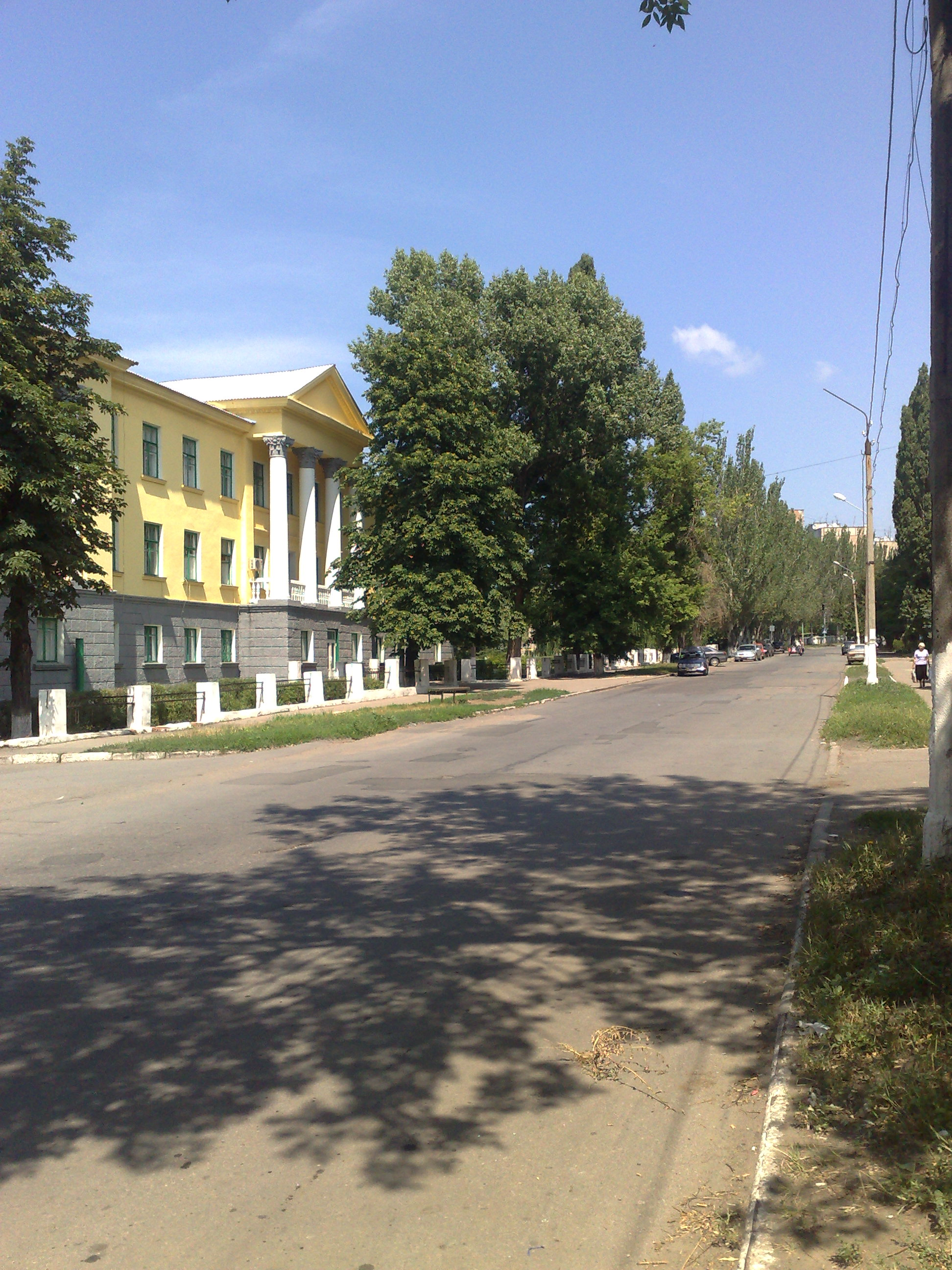 Улица 50 лет СССР в Торезе